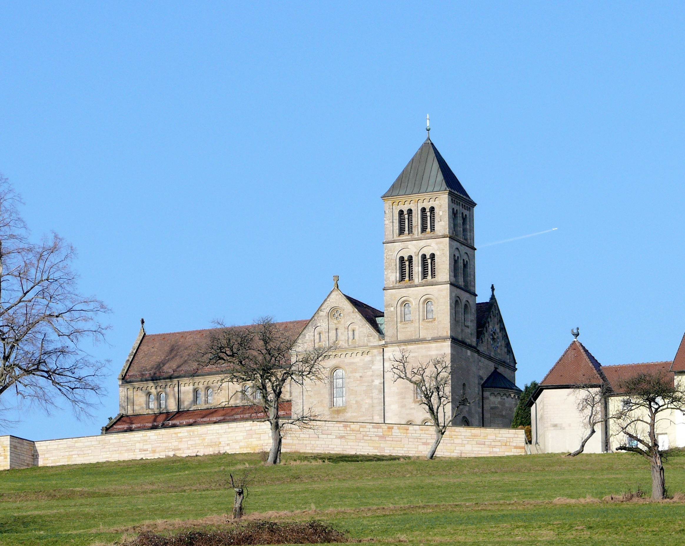 St. Jakobus Kirche, Rosenberg-Hohenberg, Germany